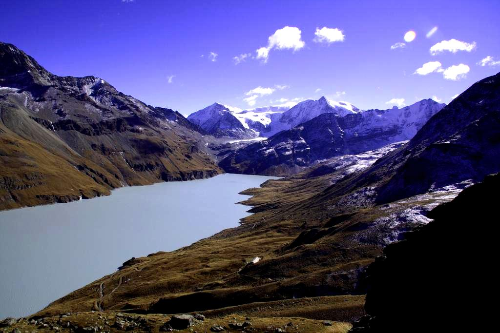 Lac des Dix (Grand Dixence Dam), Valais